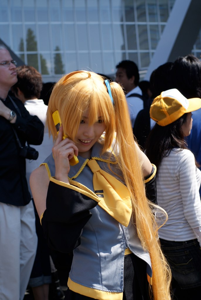 Chica otaku con un teléfono en la mano